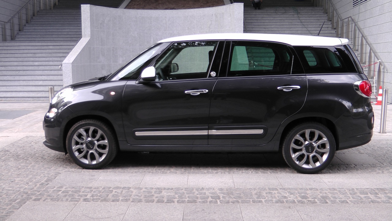 Photo Fiat 500 L Living vue de côté